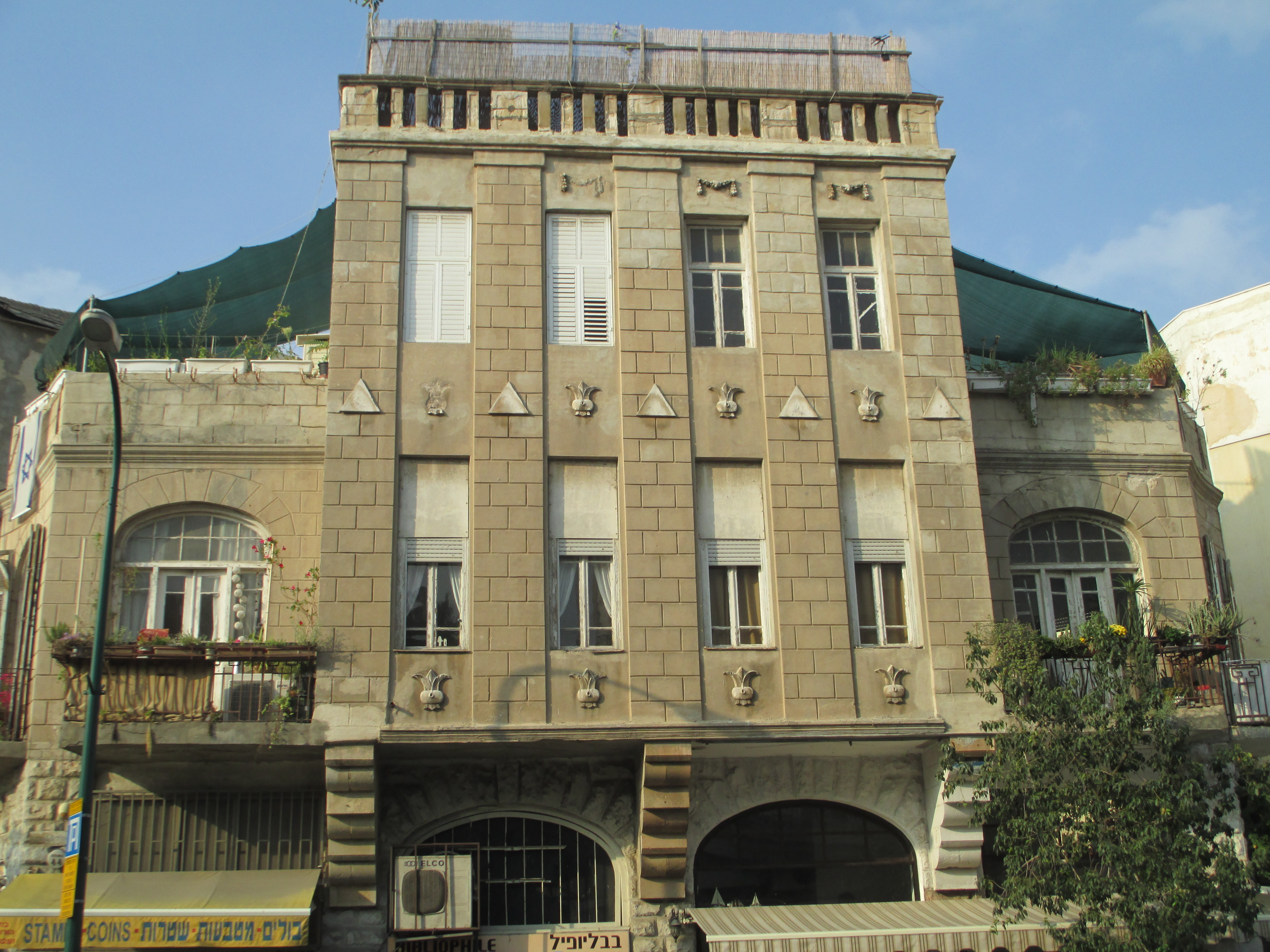 בית ליפשיץ ברחוב גאולה 44 בתל אביב